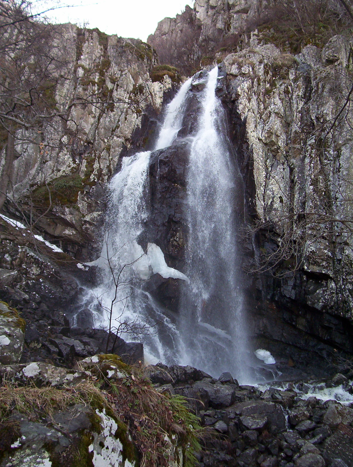 Витоша, Витоша Боянски водопад - пролет 2009